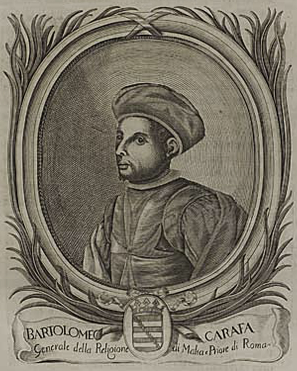 Grand maître de l'Ordre